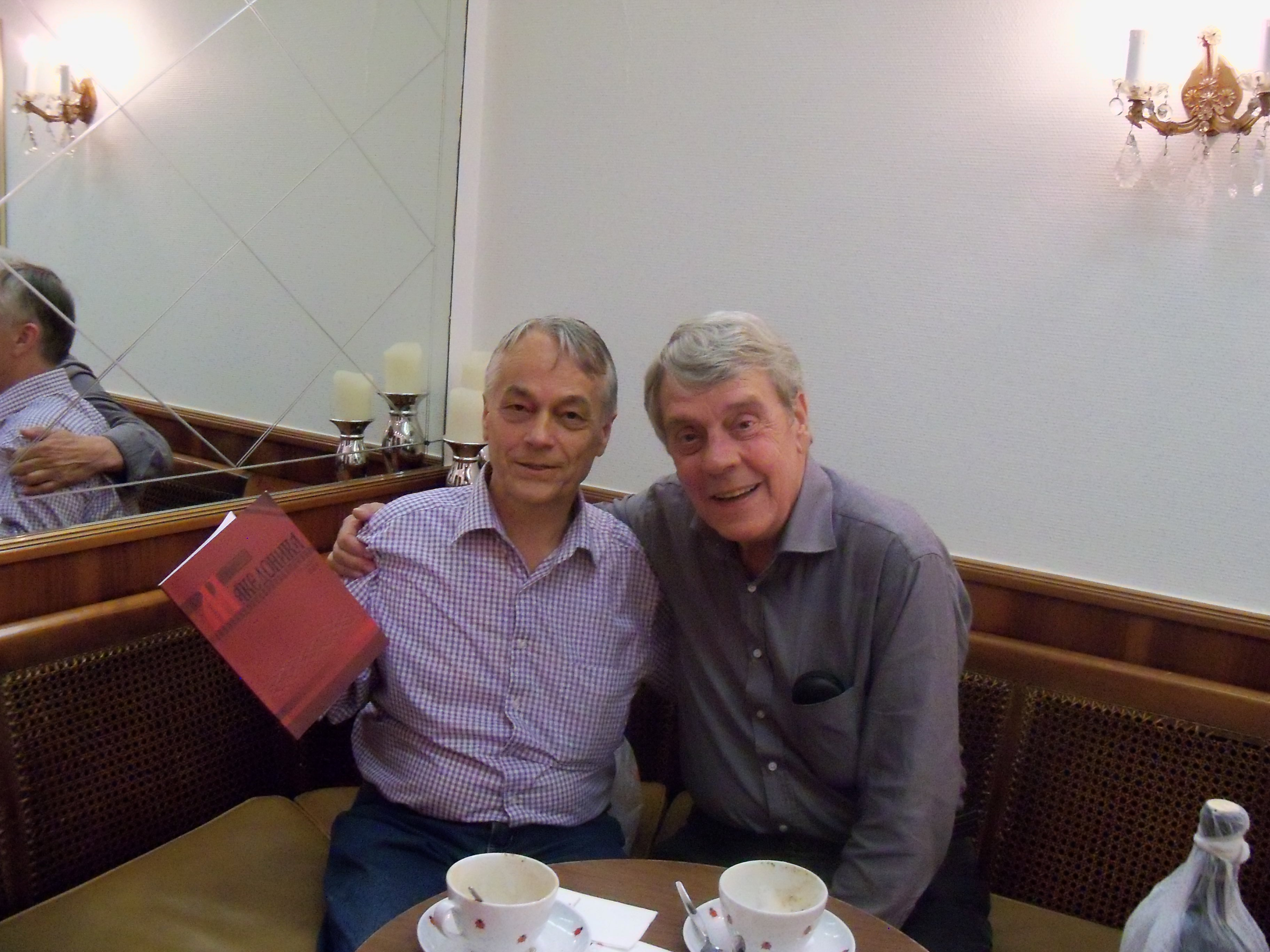 Македонскиот писател Саво Костадиновски и германскиот славист Волф Ошлис